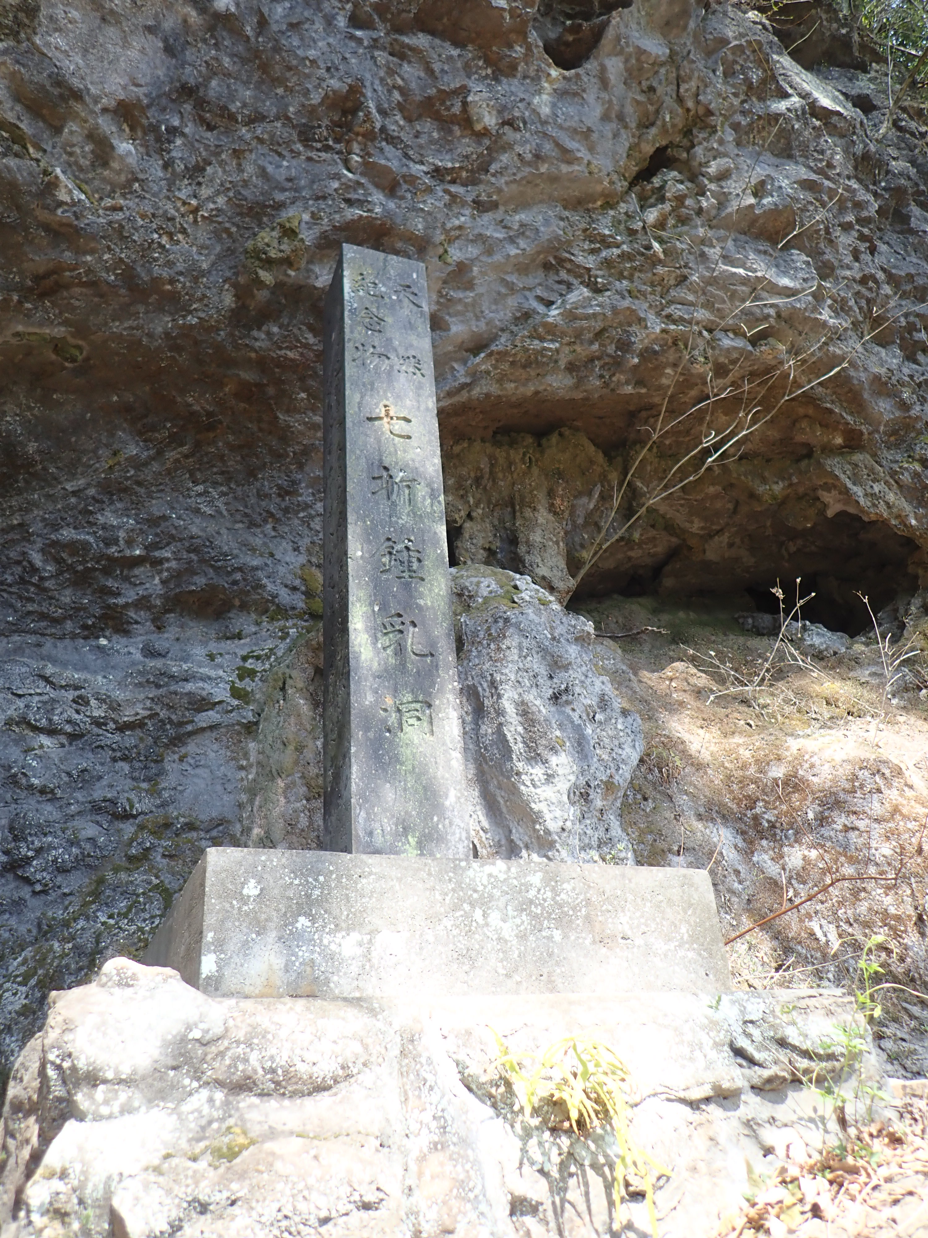 七折鍾乳洞の石碑